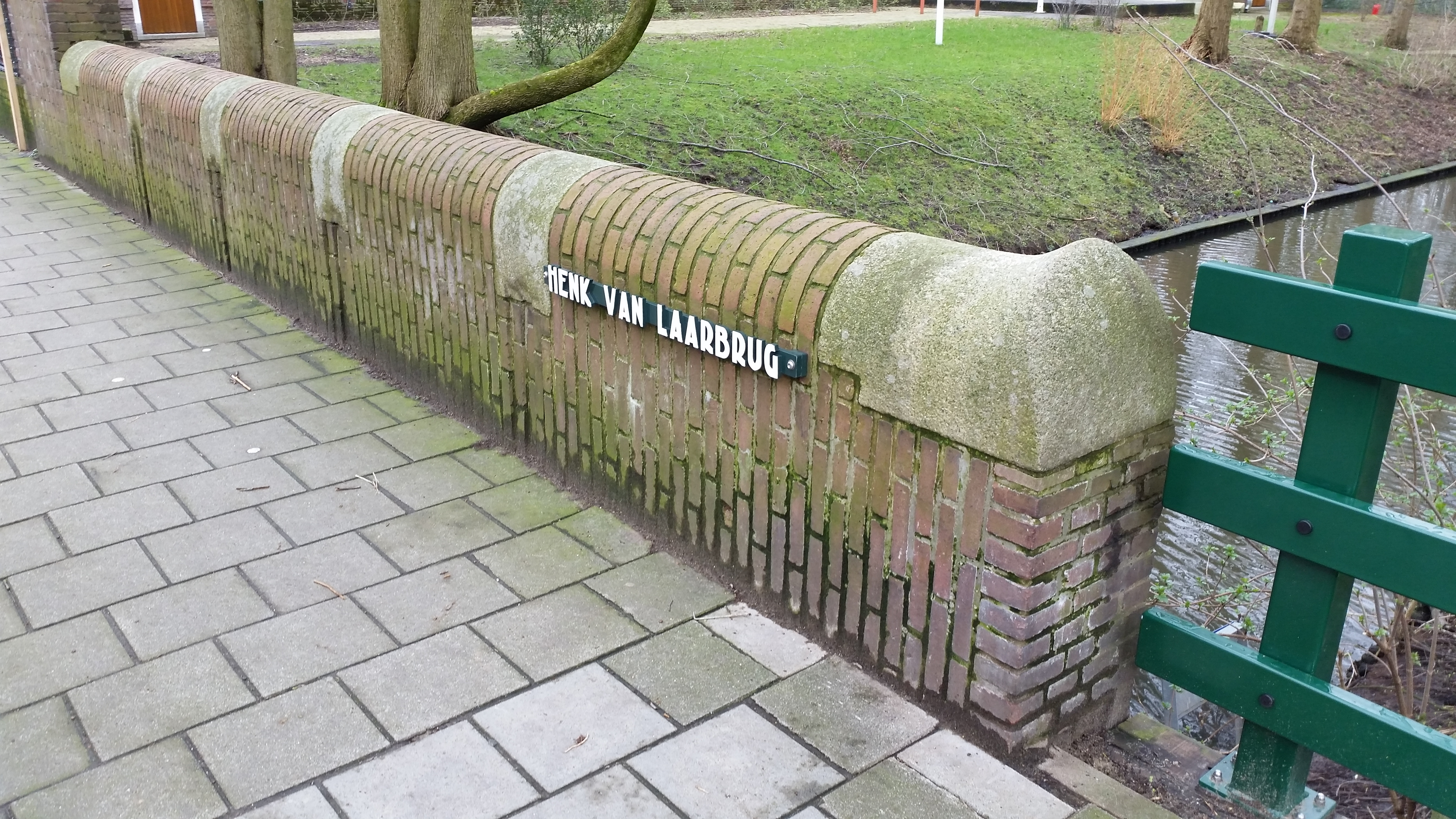 Impressie van de Henk van Laarbrug in de Linnaeusparkweg, Amsterdam-oost (februari 2020)